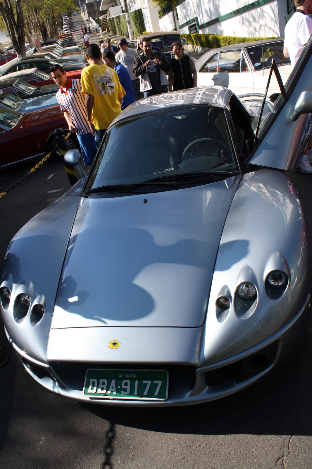 Lobini H1 - Águas de Lindóia - SP Expo Carros Antigos 2011